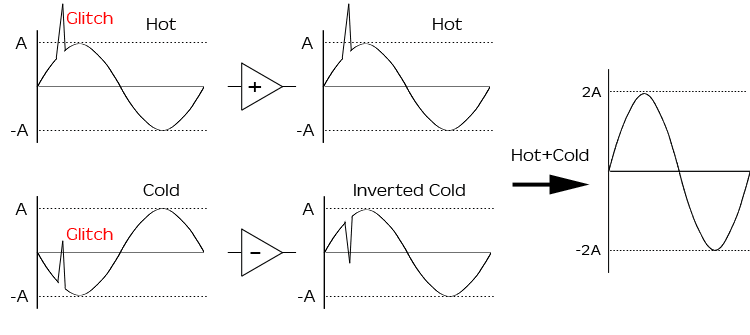 Ilustração de uma linha balanceada